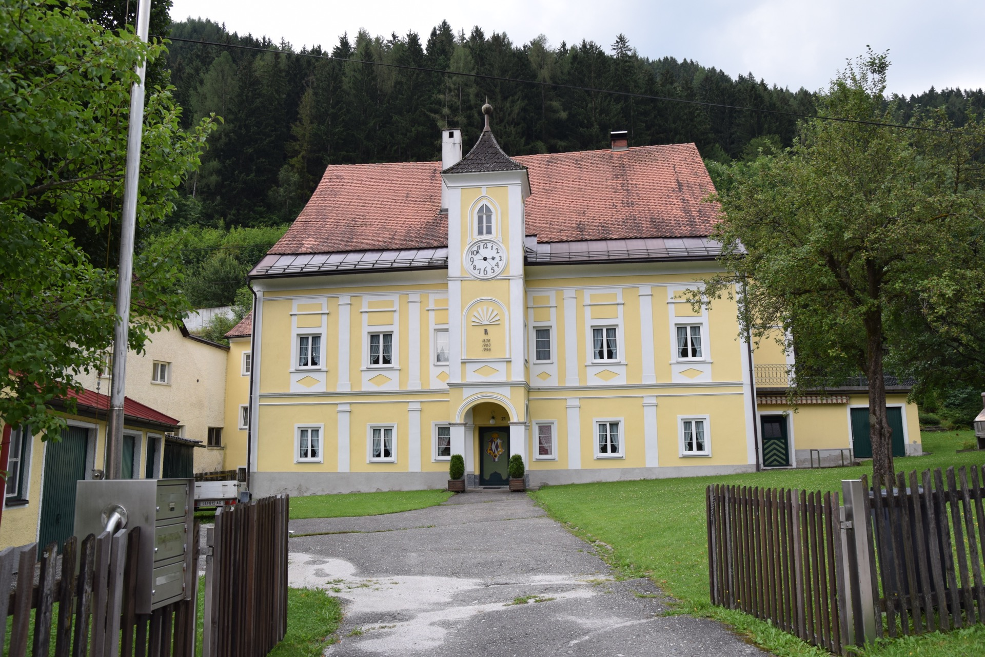 Ehem. Hammerherrenhaus